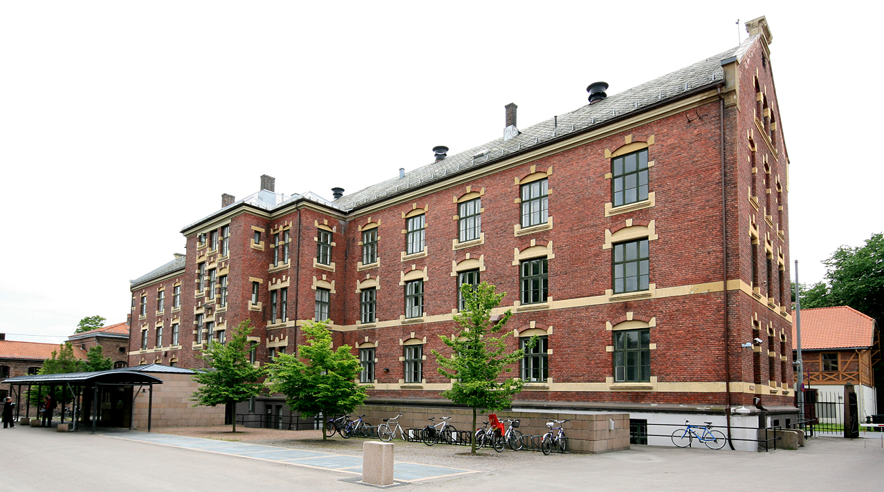 Miljøverndepartementet, Myntgata 2, Oslo. Bygd som kavalerikaserne for Forsvaret 1898; arkitekt Ove Ekman.